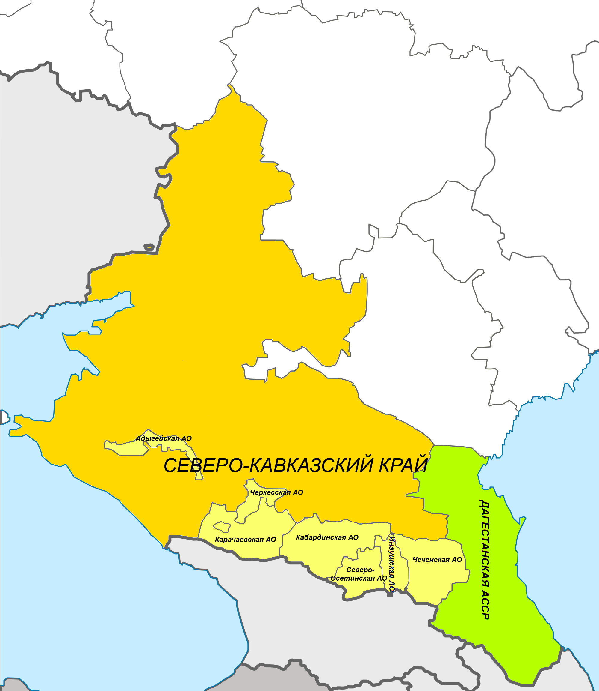 Cеверо-Кавказский край (1930-34)